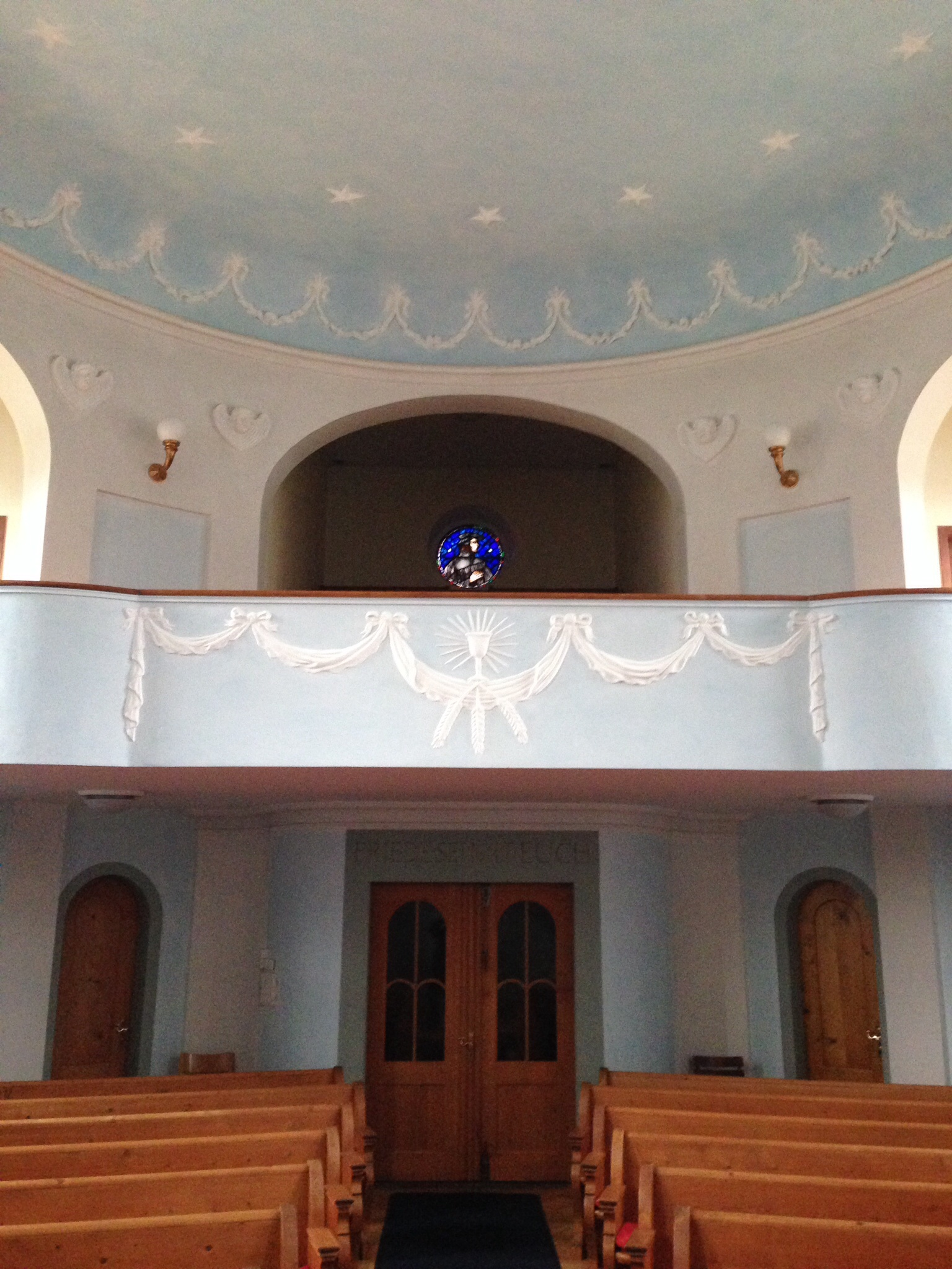 Blick vom Chor in den Kirchenraum - reformierte Kirche Landquart GR